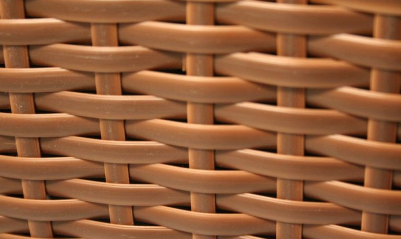 Geflecht aus Polyrattan aus einer Polyrattan-Galerie